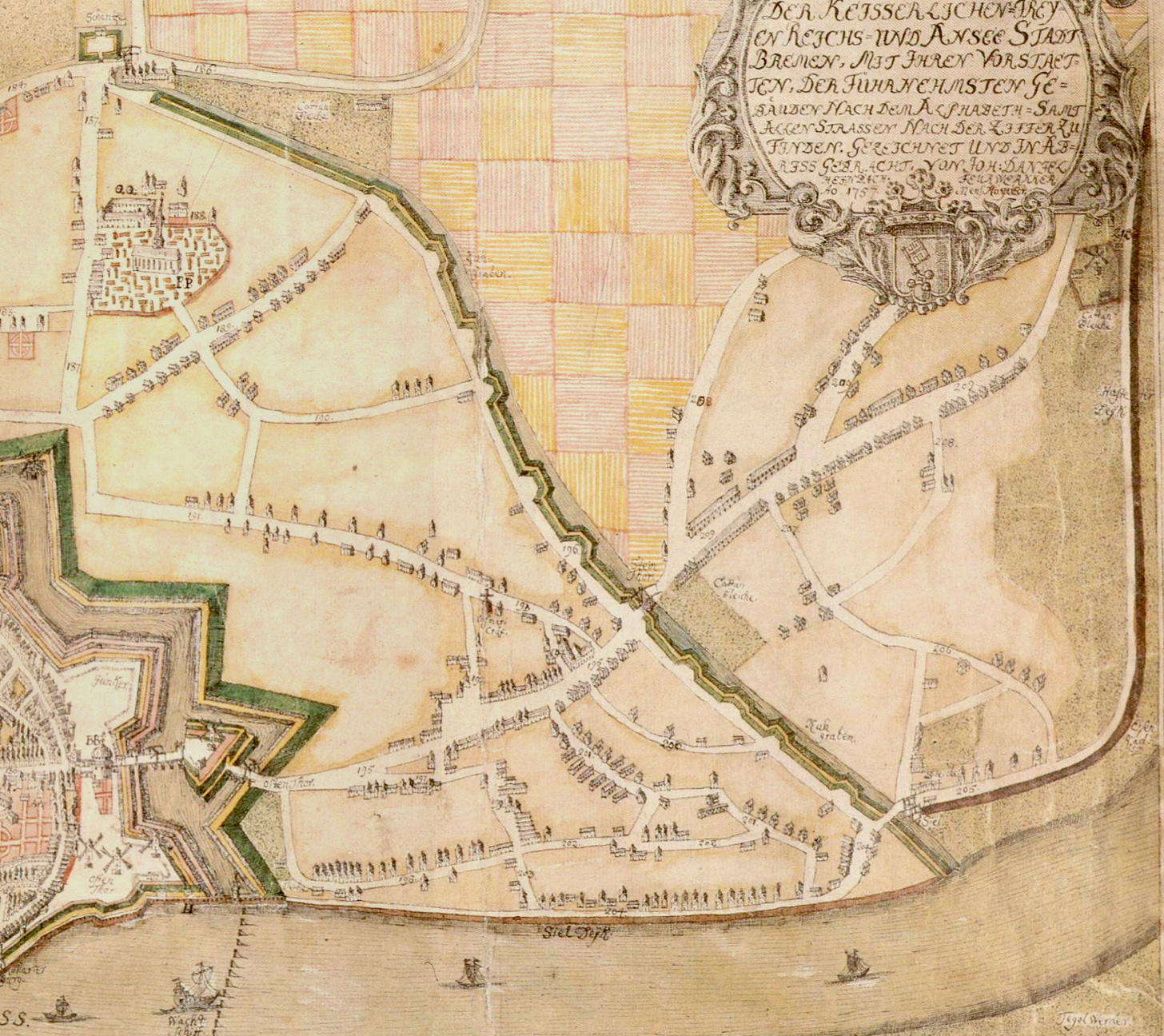 Cut of Grundriss der Keisserlichen=Freyen Reichs=und Ansee Stadt Bremen, Mit Ihren Vorstaedten von Joh. Daniel Heinbach